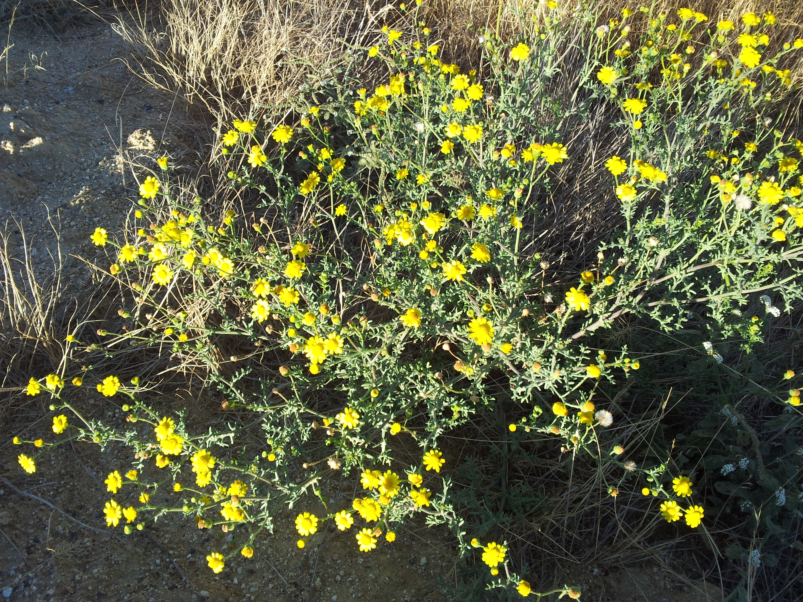 Senecio gallicus